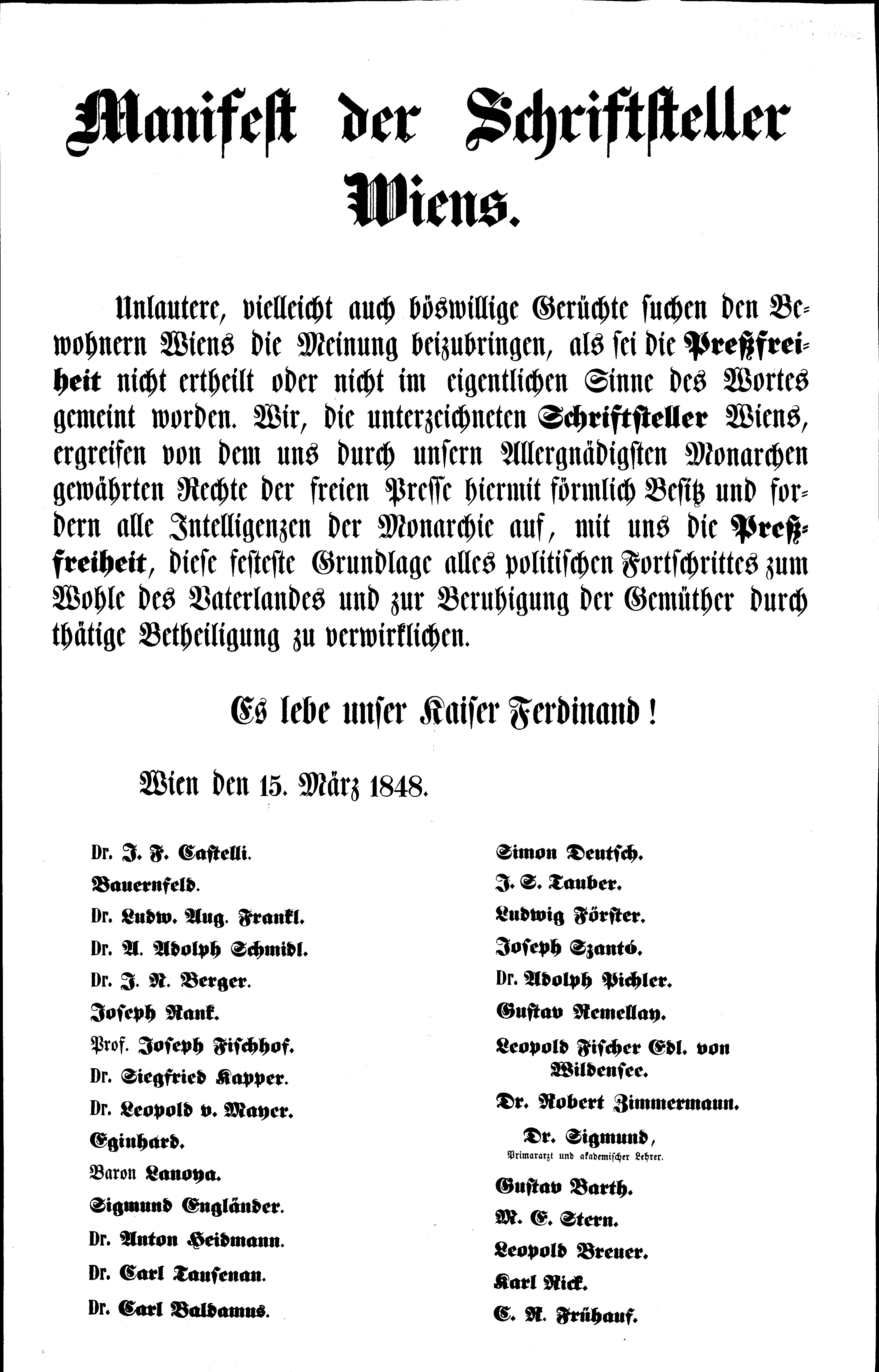 Manifest der Schriftsteller Wiens: Preßfreiheit ... ; Wien den 15. März 1848 Druck von U. Klopf sen. und Alex. Eurich in Wien, Wollzeile Nr. 782, 1848 Ignaz Franz Castelli, Verfasser; Karl Rick, 1815-1881, Verfasser; C. R. Frühauf , Verfasser; Eduard von Bauernfeld; Ludwig August Frankl; Adolph Schmidl, 1802-1863; Johann Nepomuk Berger (Politiker); Josef Rank, 1816-1896; Joseph Fischhof; Siegfried Kapper; Lanoye, ... ; Siegmund Engländer, 1828-1902; Anton Heidmann; Karl Tausenau, 1813-1873; Max Karl Baldamus, 1784-1852; Simon Deutsch; Joseph Samuel Tauber; Ludwig Förster (??); Joseph Szántó; Adolf Pichler; Gusztáv Remellay; Leopold von Fischer ??; Robert Zimmermann; Carl Ludwig von Sigmund, 1810-1883; Gustav Barth? ; Max E. Stern, 1811-1873; Leopold Breuer